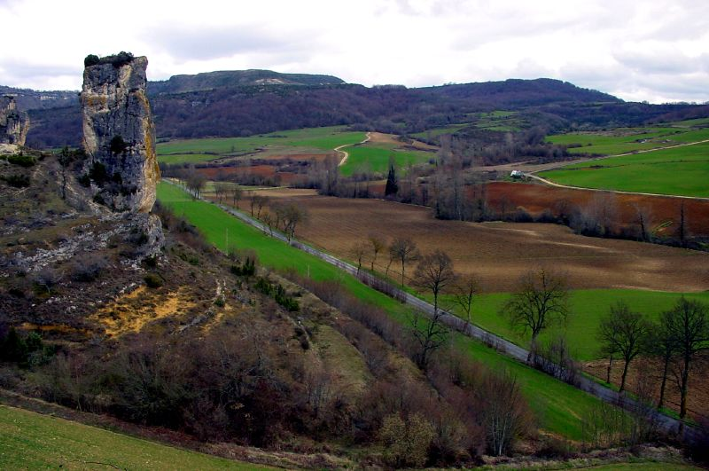 Markinezko inguruak.